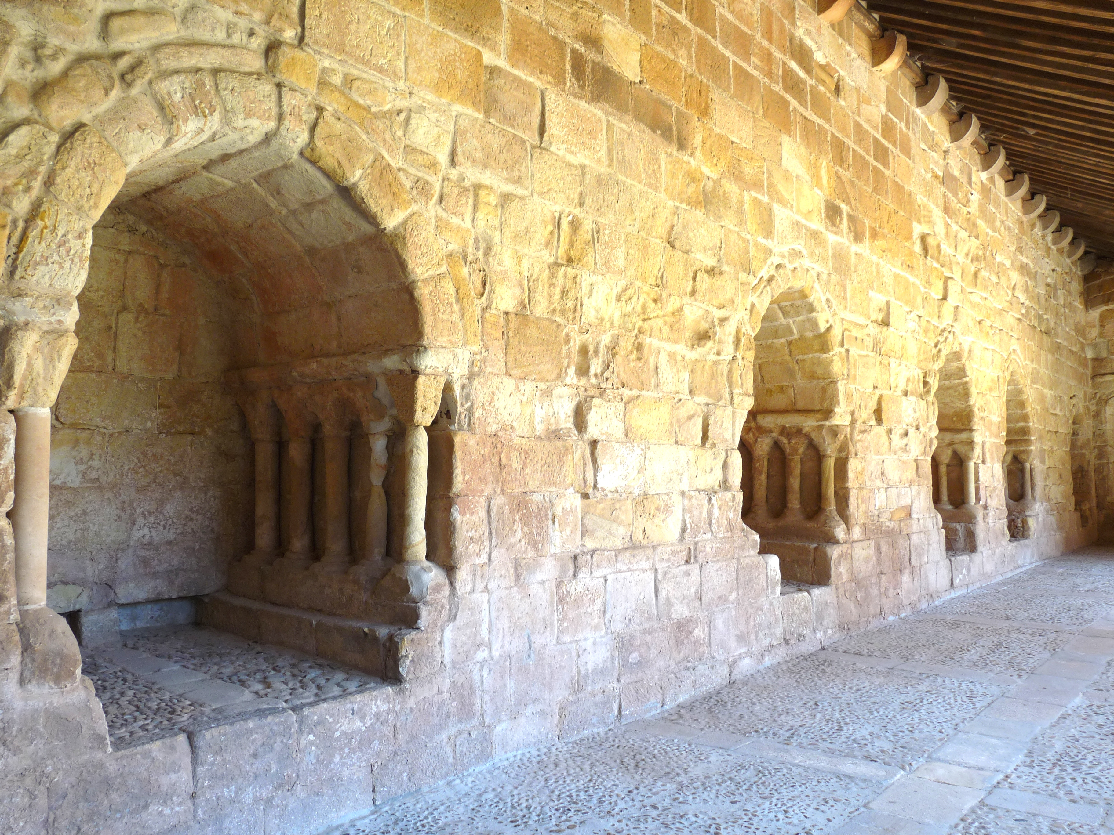 Arcosoli destinati alla sepoltura del clero presenti nella parete della galleria occidentale con orientamento E-W (in totale sei).